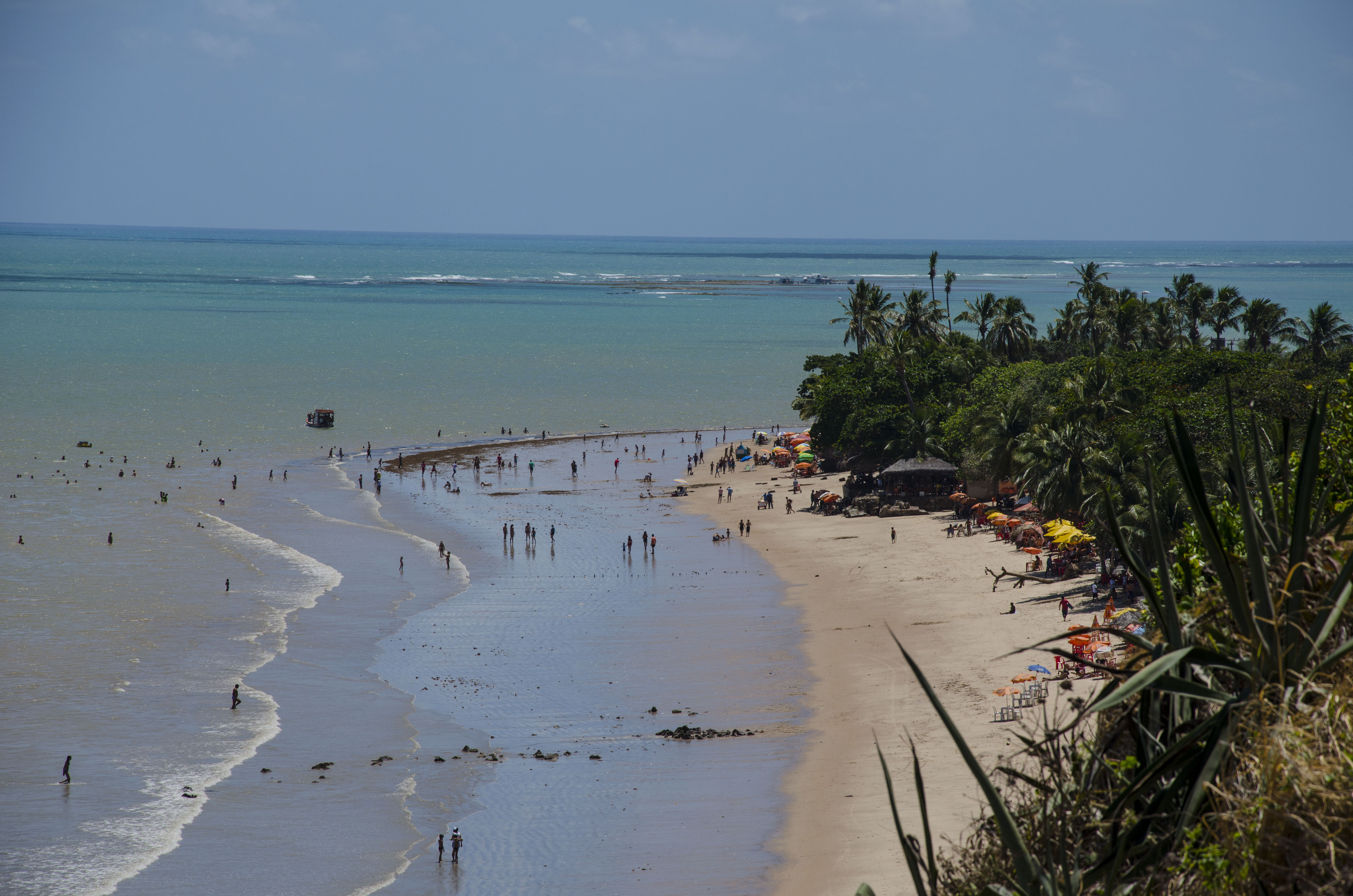 Pra quem não sabe, a Ponta do Seixas é o ponto mais oriental do continente americano e da parte continental do Brasil. Localiza-se na parte leste da cidade de João Pessoa, capital do estado da Paraíba.